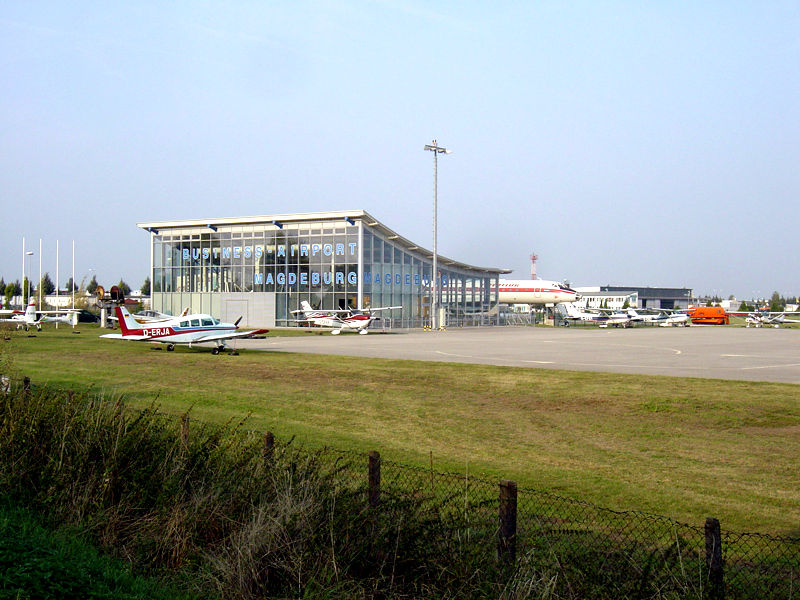 Terminal des Flugplatzes Magdeburg